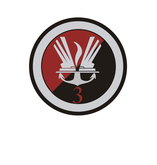 WZÓR GRAFICZNY OZNAKI ROZPOZNAWCZEJ 3. BATALIONU INŻYNIERYJNEGO NA MUNDUR WYJŚCIOWY